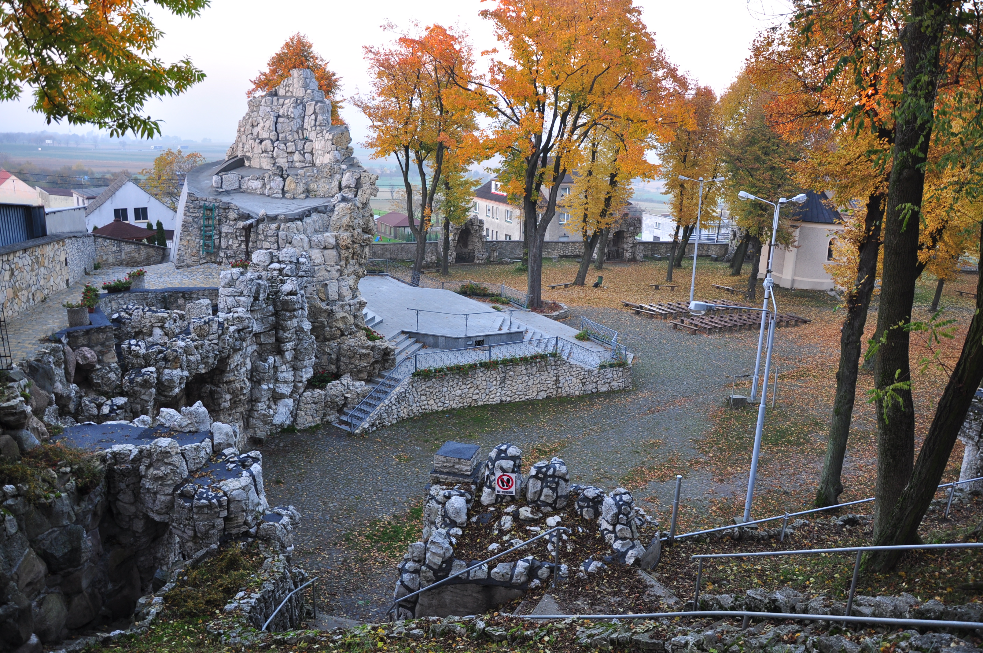 Góra Świętej Anny, 26 kaplic Drogi Męki Pańskiej i Dróżek Matki Boskiej brak zabytków w zespole